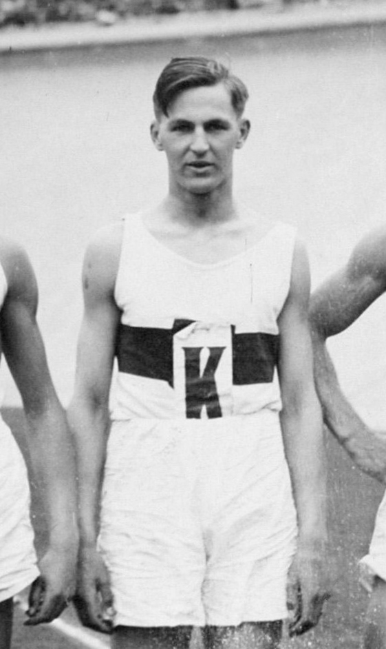 Sport. Olympische Spelen 1928 Amsterdam, Nederland : Richard Krebs.